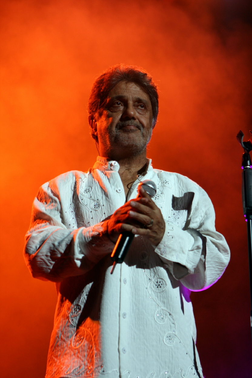 Dariush Malaysia 2009